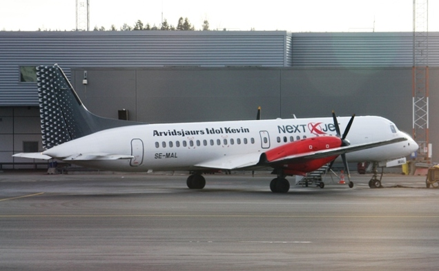 Nextjet BAe ATP (Bilden beskuren)